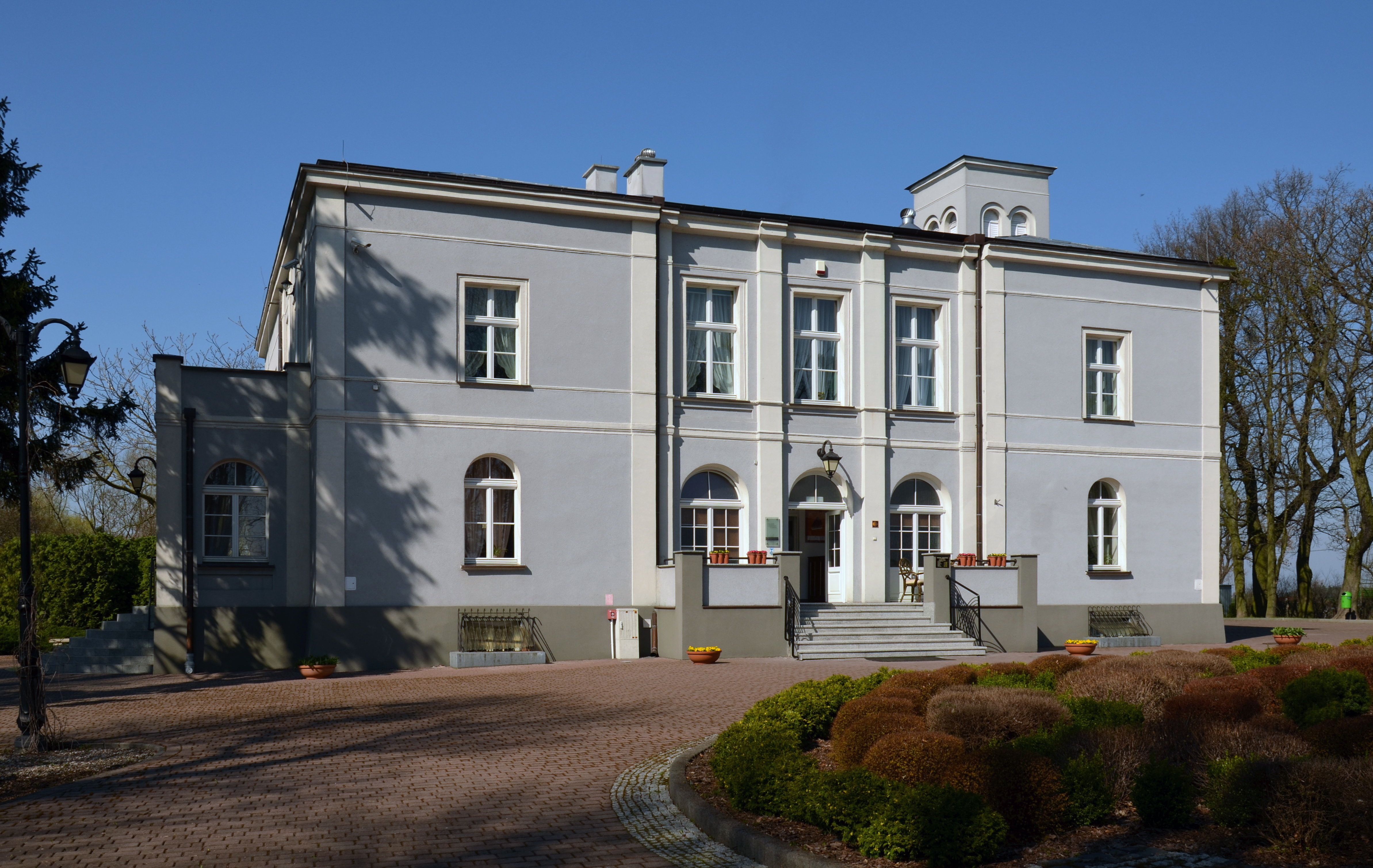 Szafarnia, zespół pałacowy, dwór